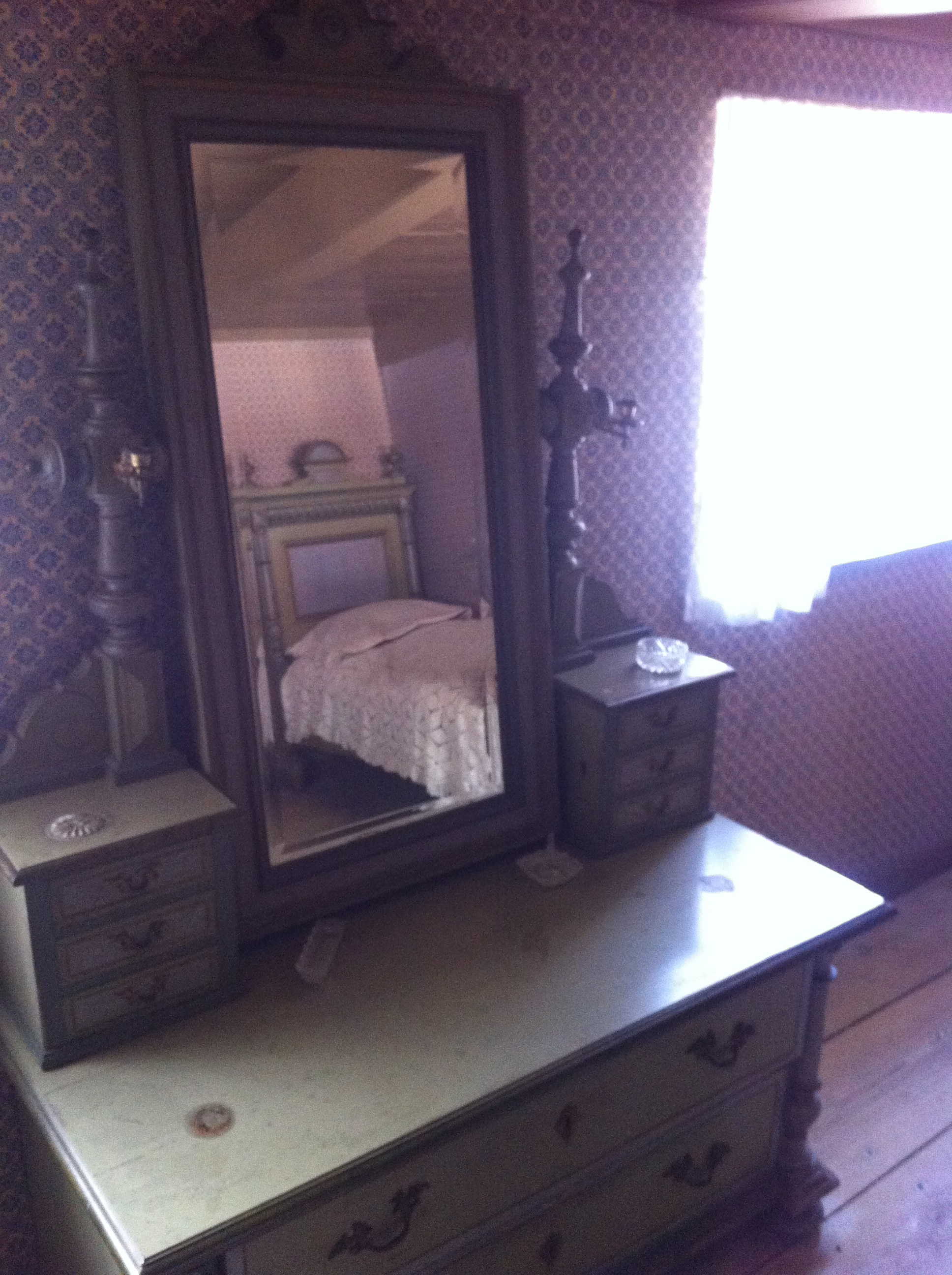 Billede taget på Wiki-fotodag juni 2012. Frilandsmuseet.